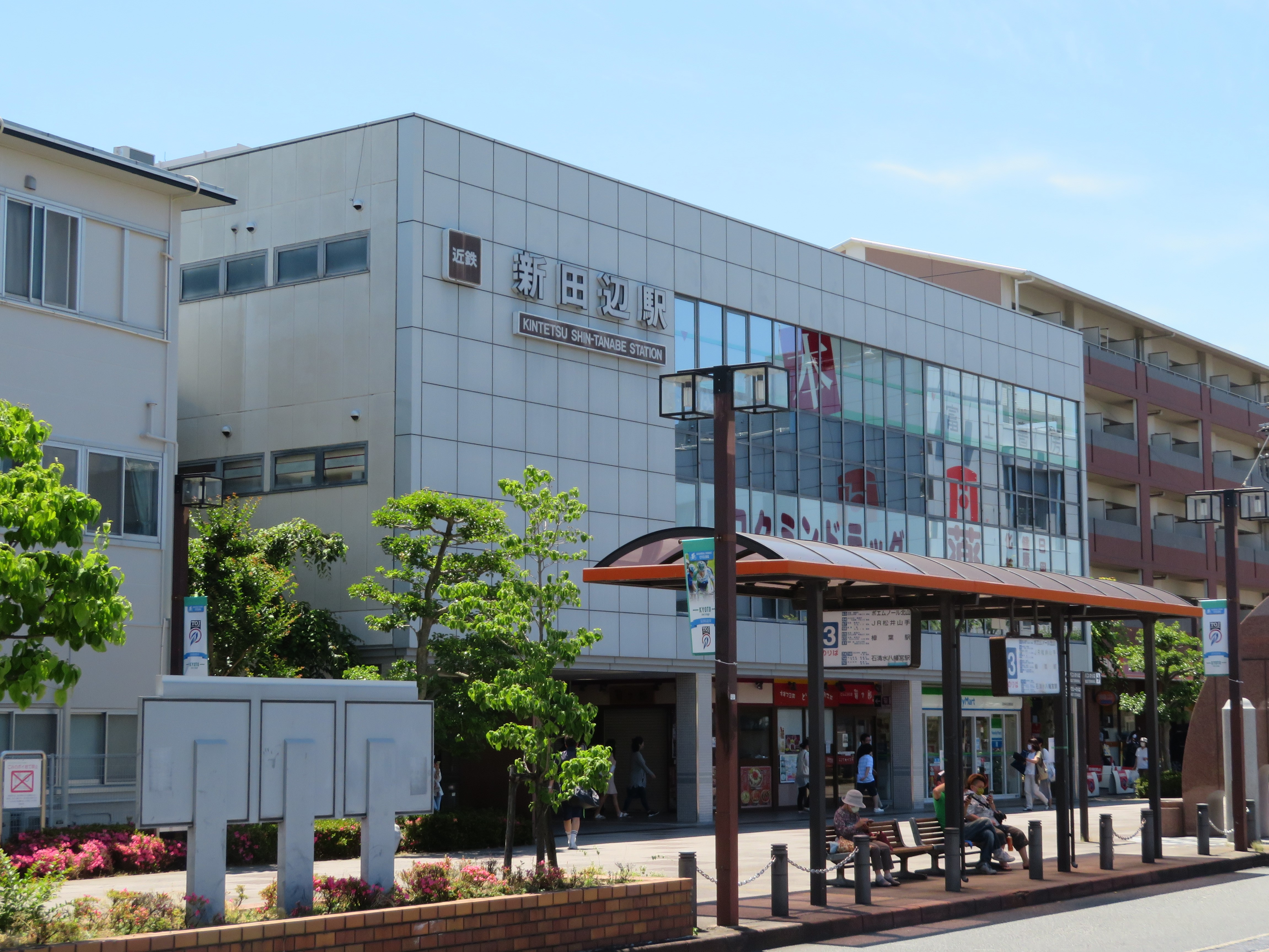 近鉄新田辺駅